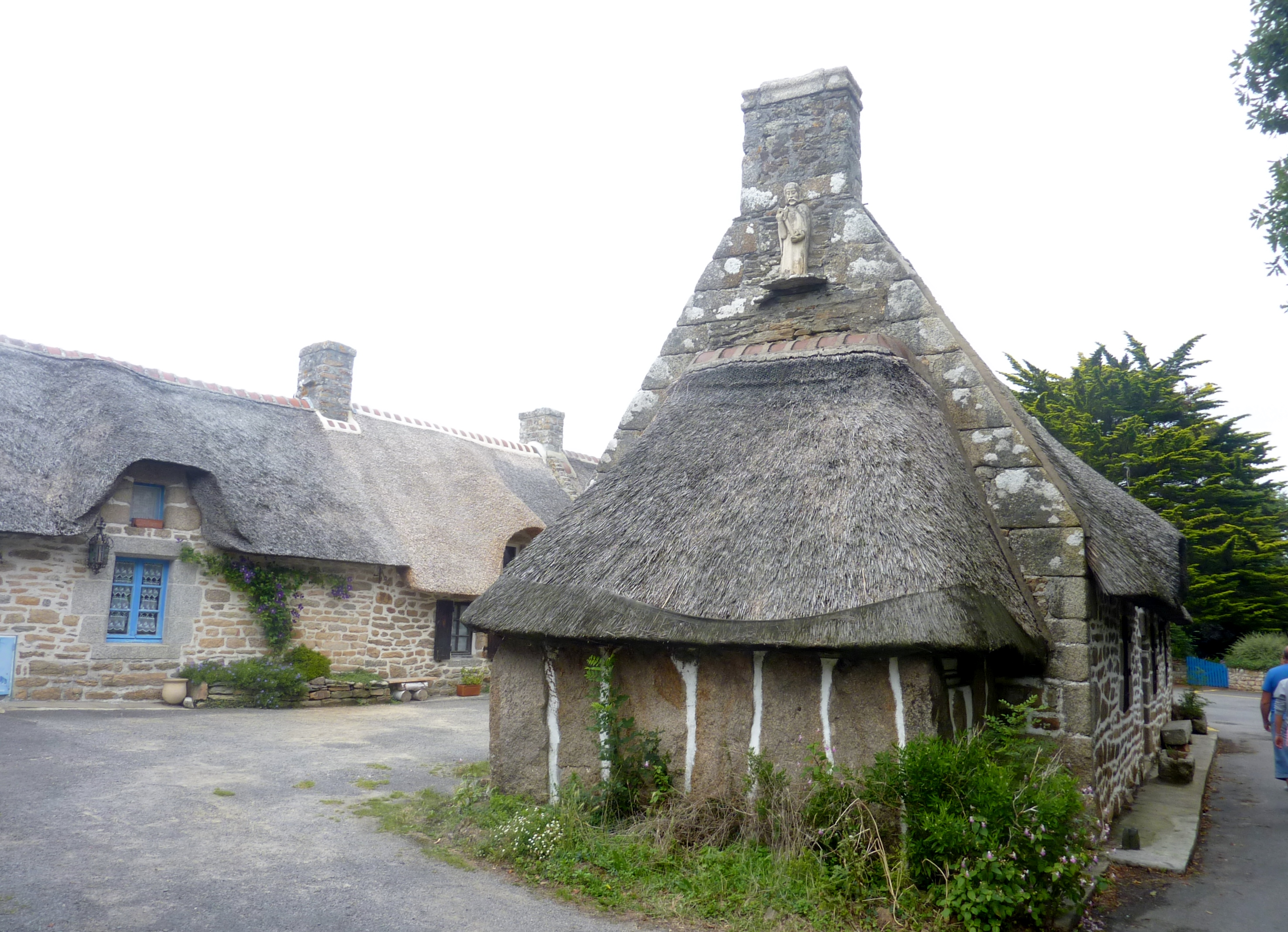 Névez : appentis en "pierres debout" dans le hameau de Kerascoët